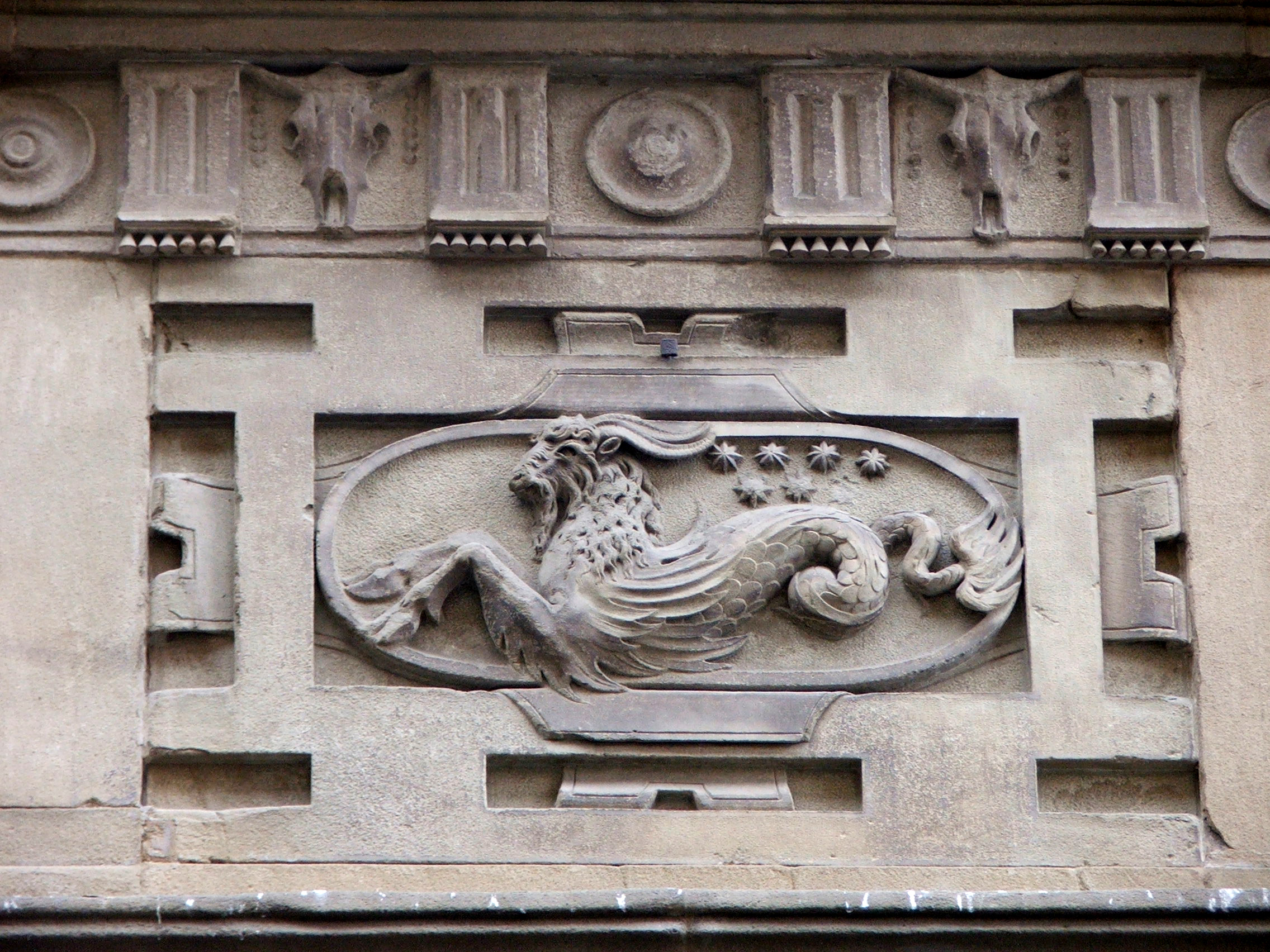 facciata di Palazzo Budini Gattai su via de' Servi, particolare del balcone sopra il portale